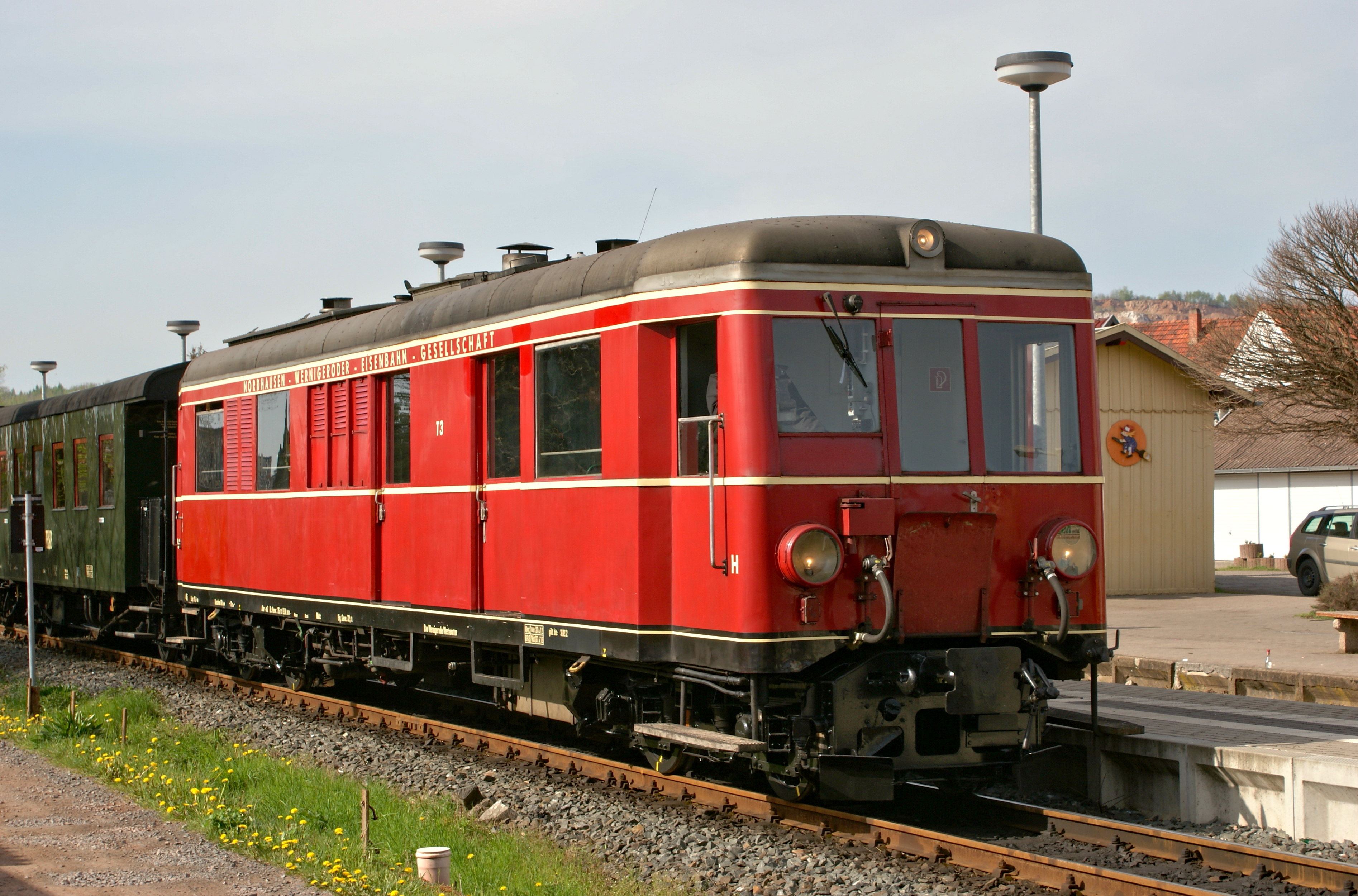 Triebwagen NWE T3 (187 025) MAN 1938 Bo´Bo´de mit Sonderzug in Niedersachswerfen Ost 28. April 2012